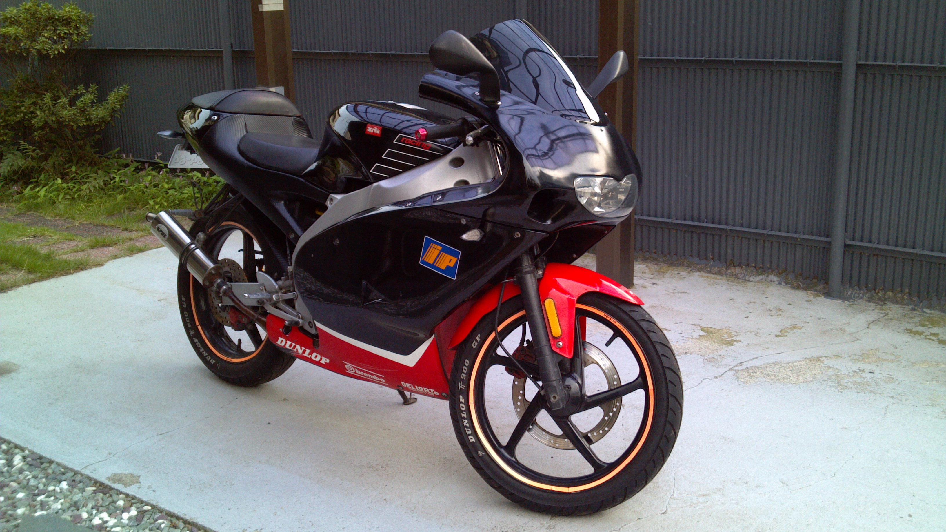 私のバイクです